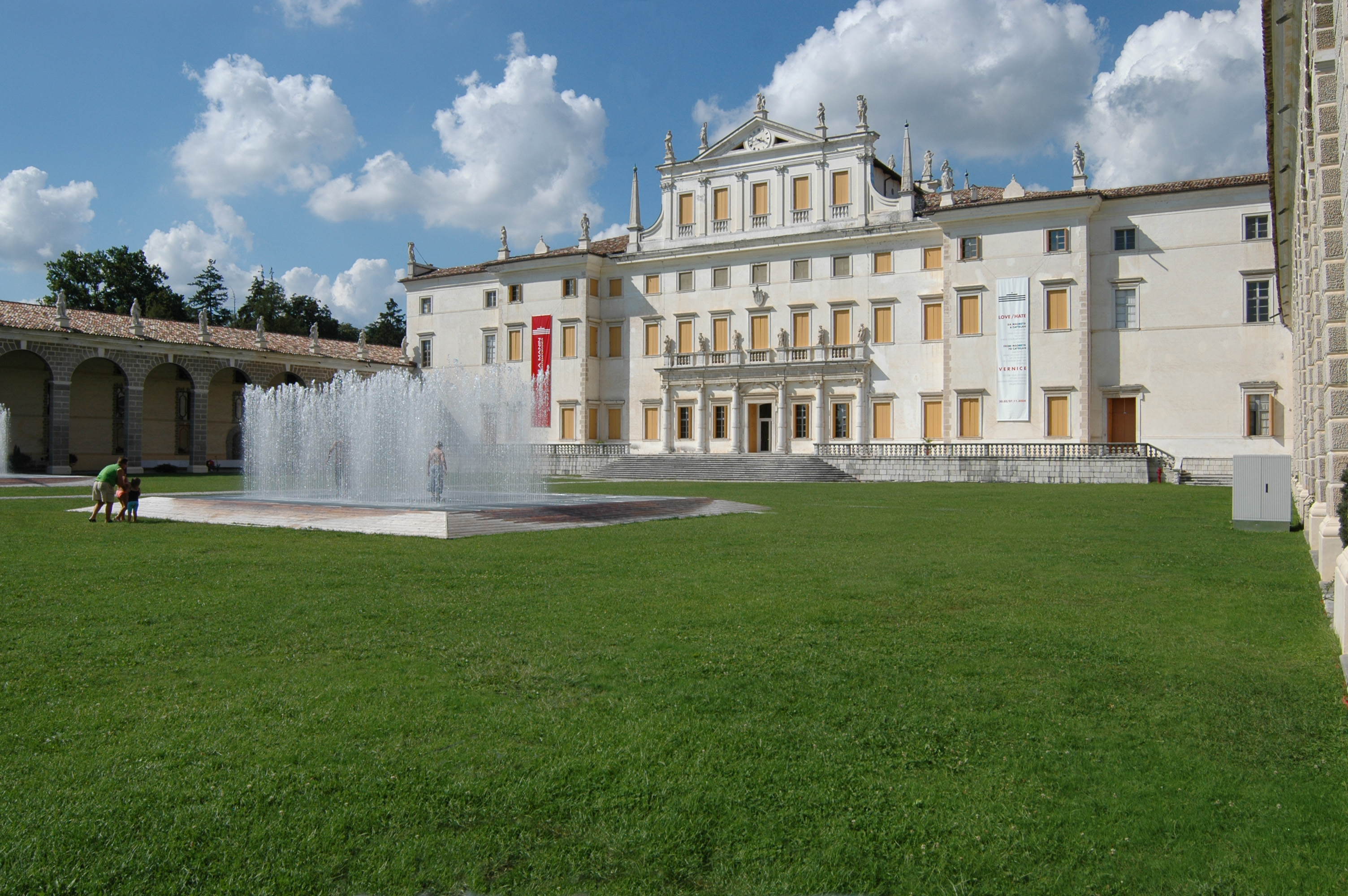 Villa Manin a Passariano, Codroipo, Friuli Venezia Giulia, Italia.Villa Manin